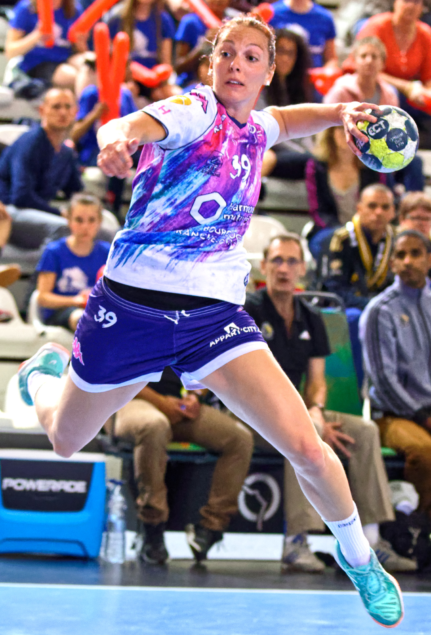 Rencontre de championnat entre Issy Paris Hand et Dijon. A Issy Les Moulineaux, le 22 avril 2017.